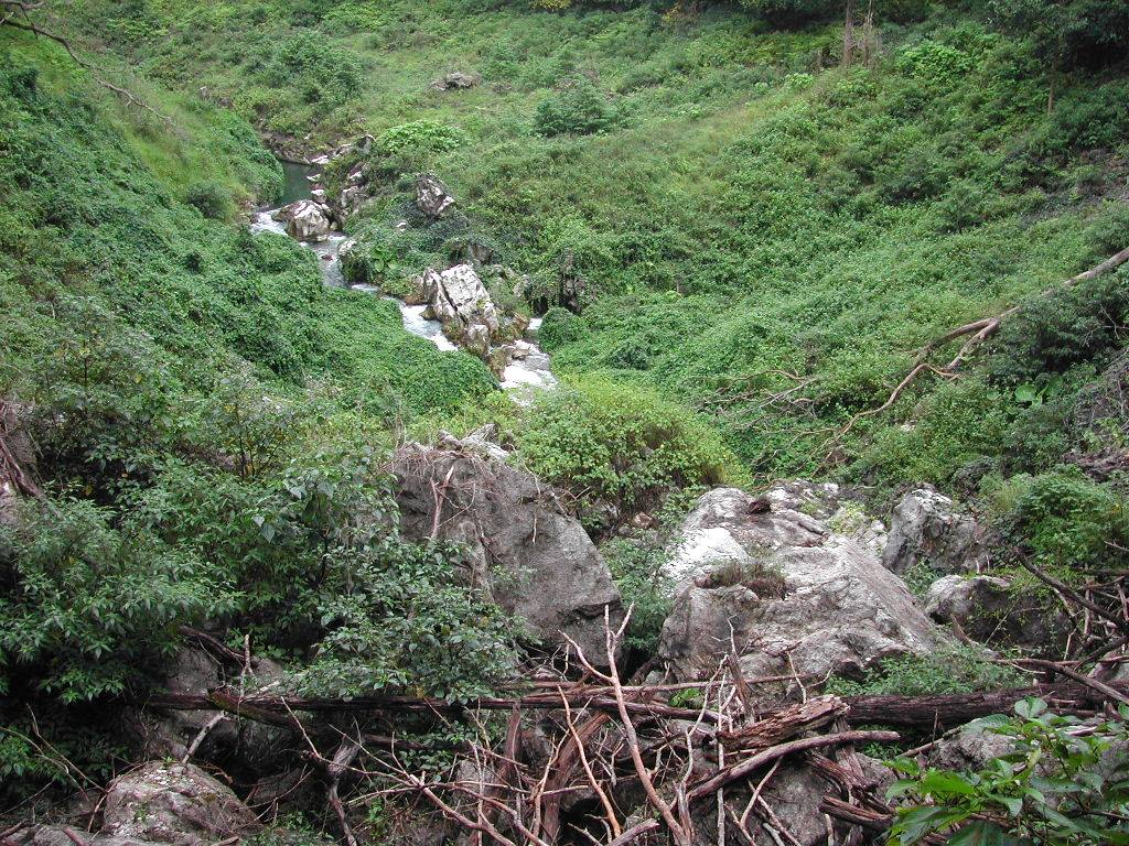 Ponor von Mainina, Lautém, Osttimor